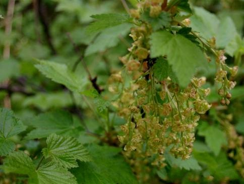 Ribes rubrum